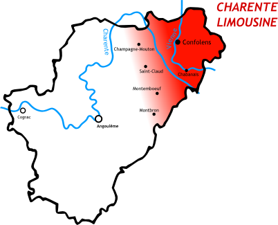 Carte de la Charente limousine